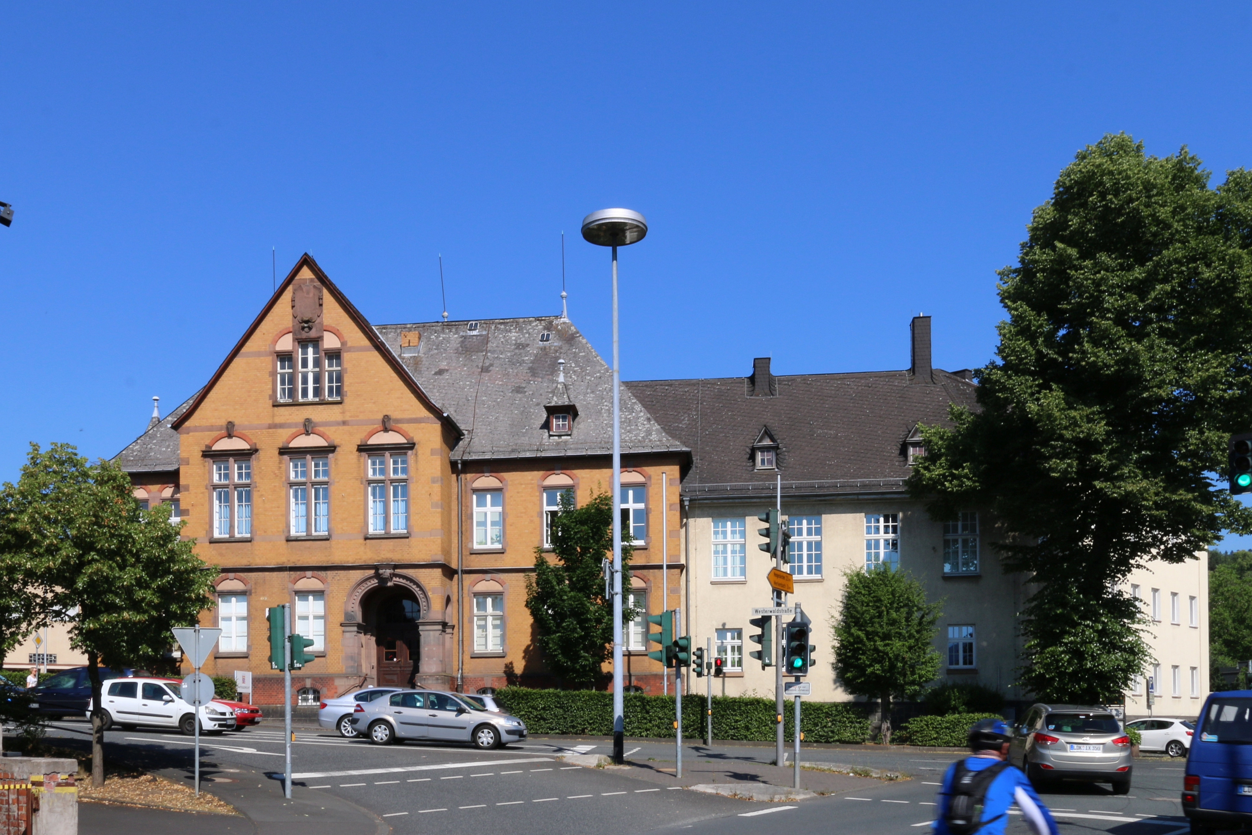 Herborn, Lahn-Dill-Kreis: Amtsgericht